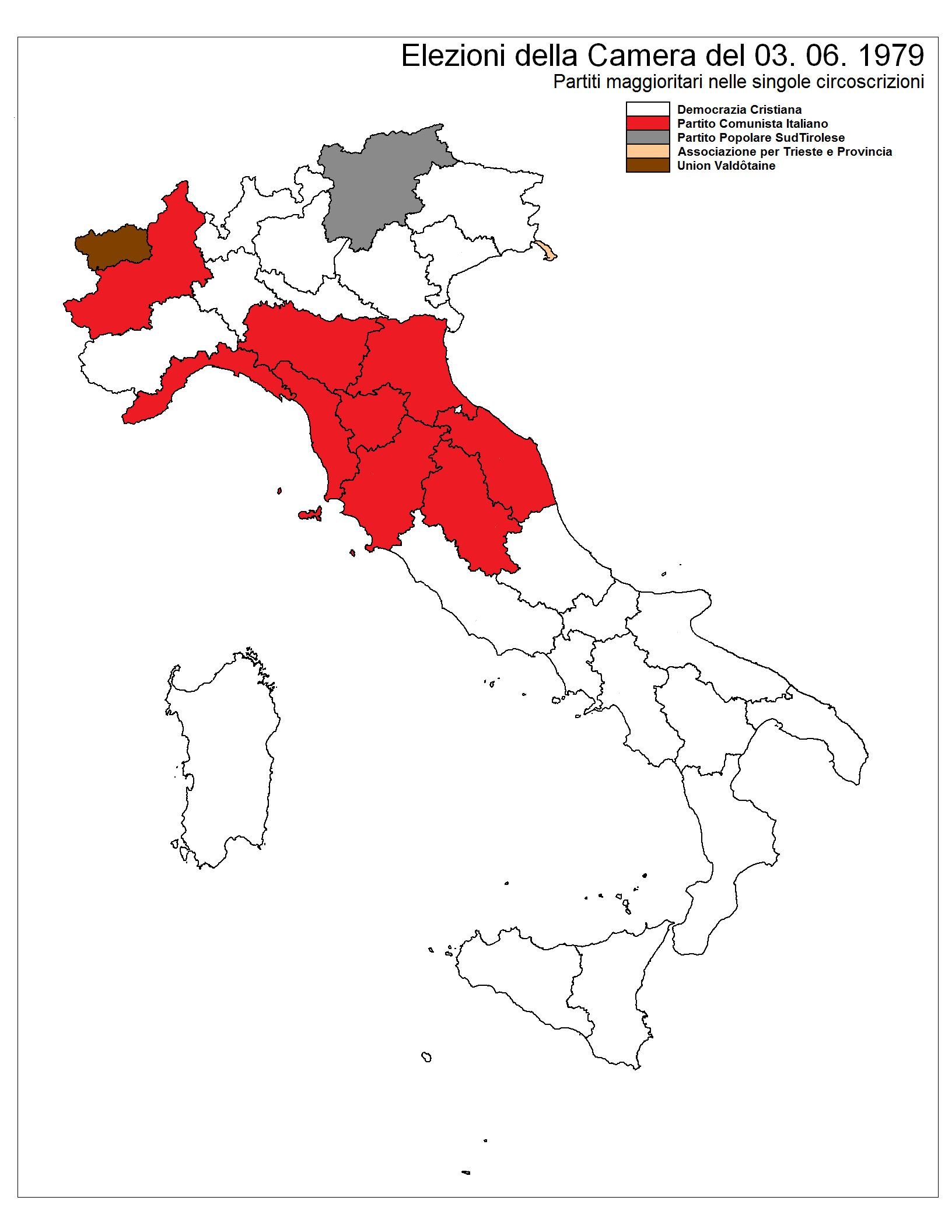 पाली pālī: Partiti maggioritari nel 1979 nelle singole circoscrizioni.